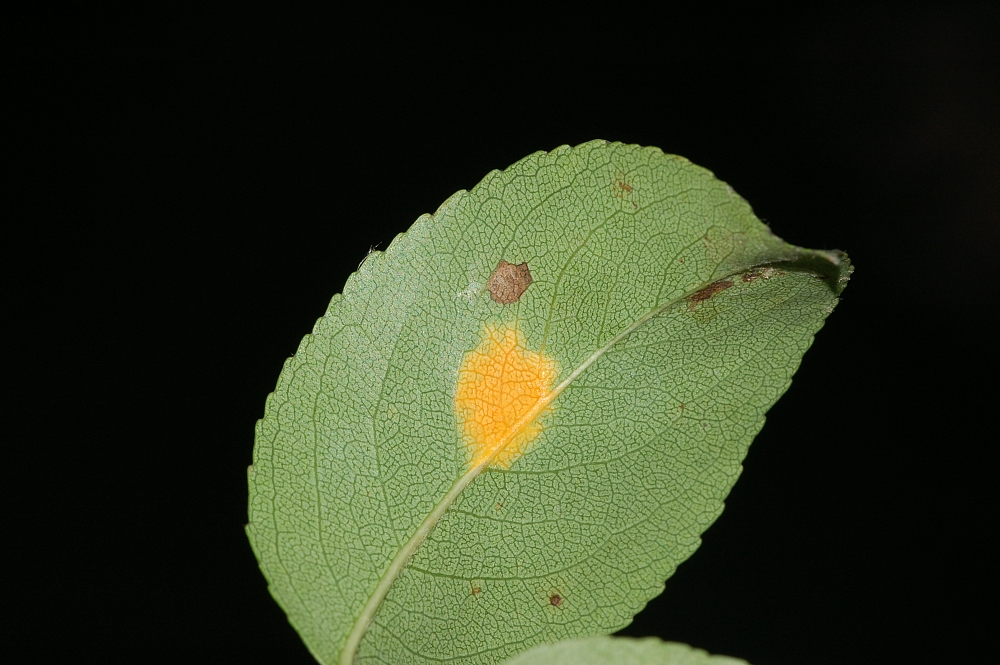 Gymnosporangium sabinae, Birnengitterrost, Frankfurt am Main, Nied, Deutschland, Germany